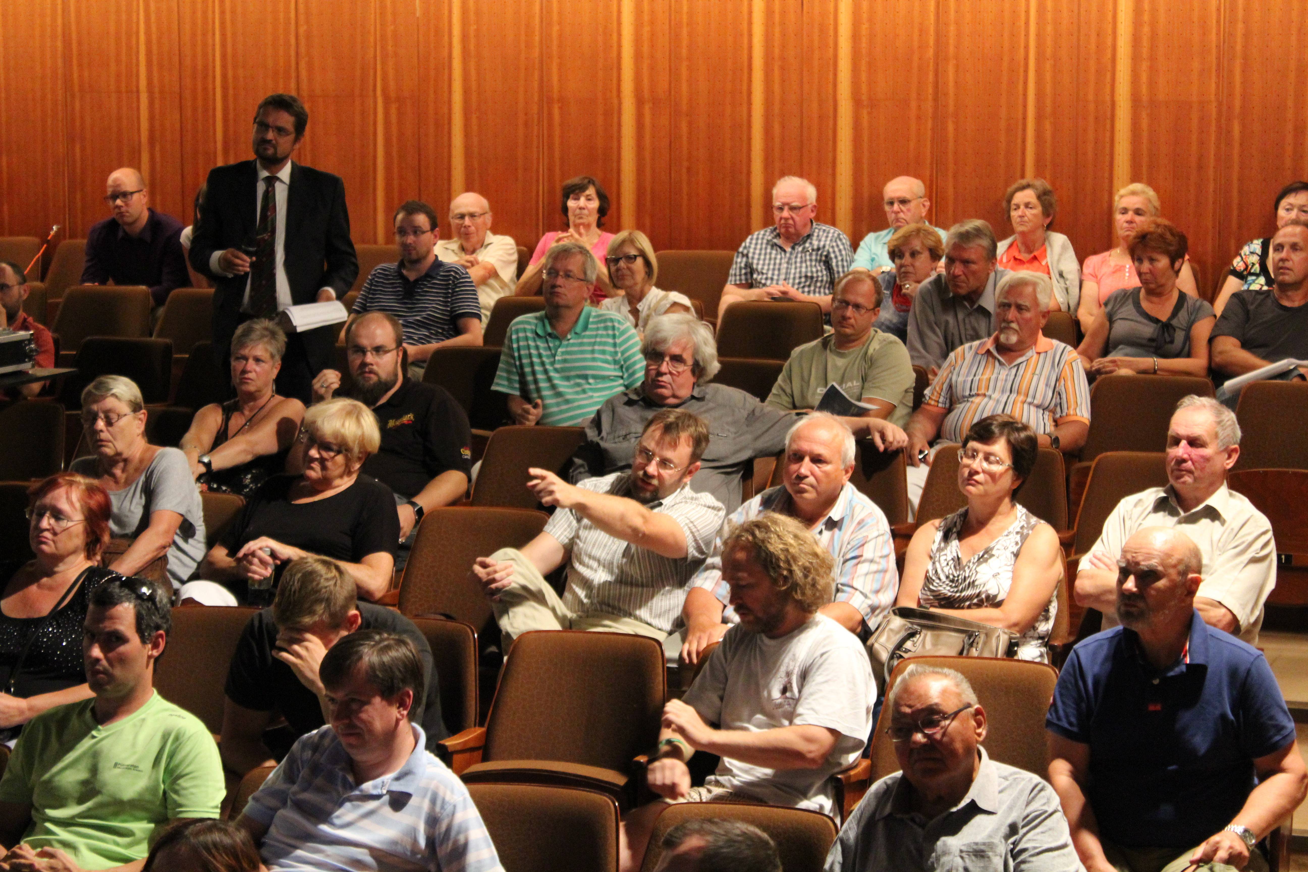 Veřejná beseda Jundrov 8. září - auditorium